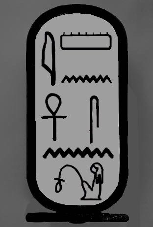 representación del cartucho de anjesenamon, o ankhesenamun (ˁnḫ-s-n-imn o "su vida es de Amon" o "ella vive por Amon").